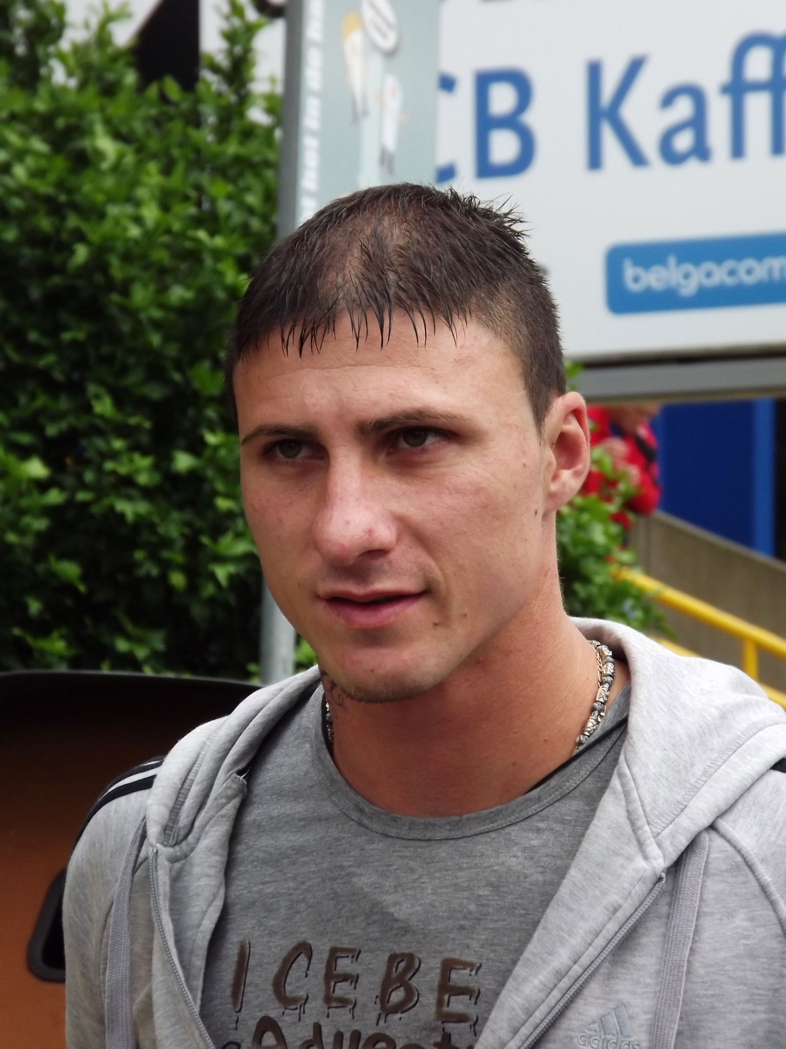 Bojan Jorgačević (Club Brugge)